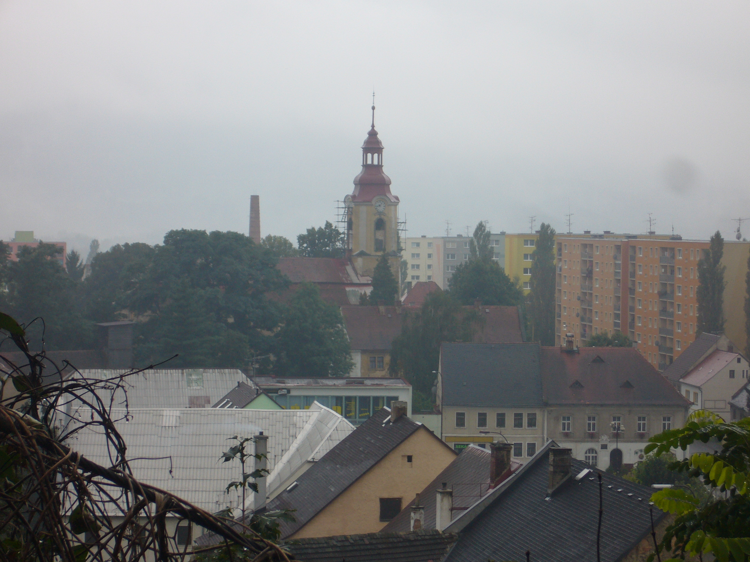 Böhmisch Wartenberg heute